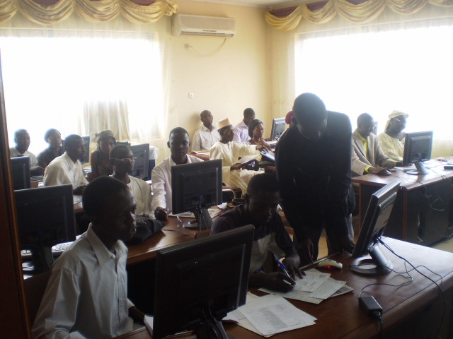 Formation au CNF